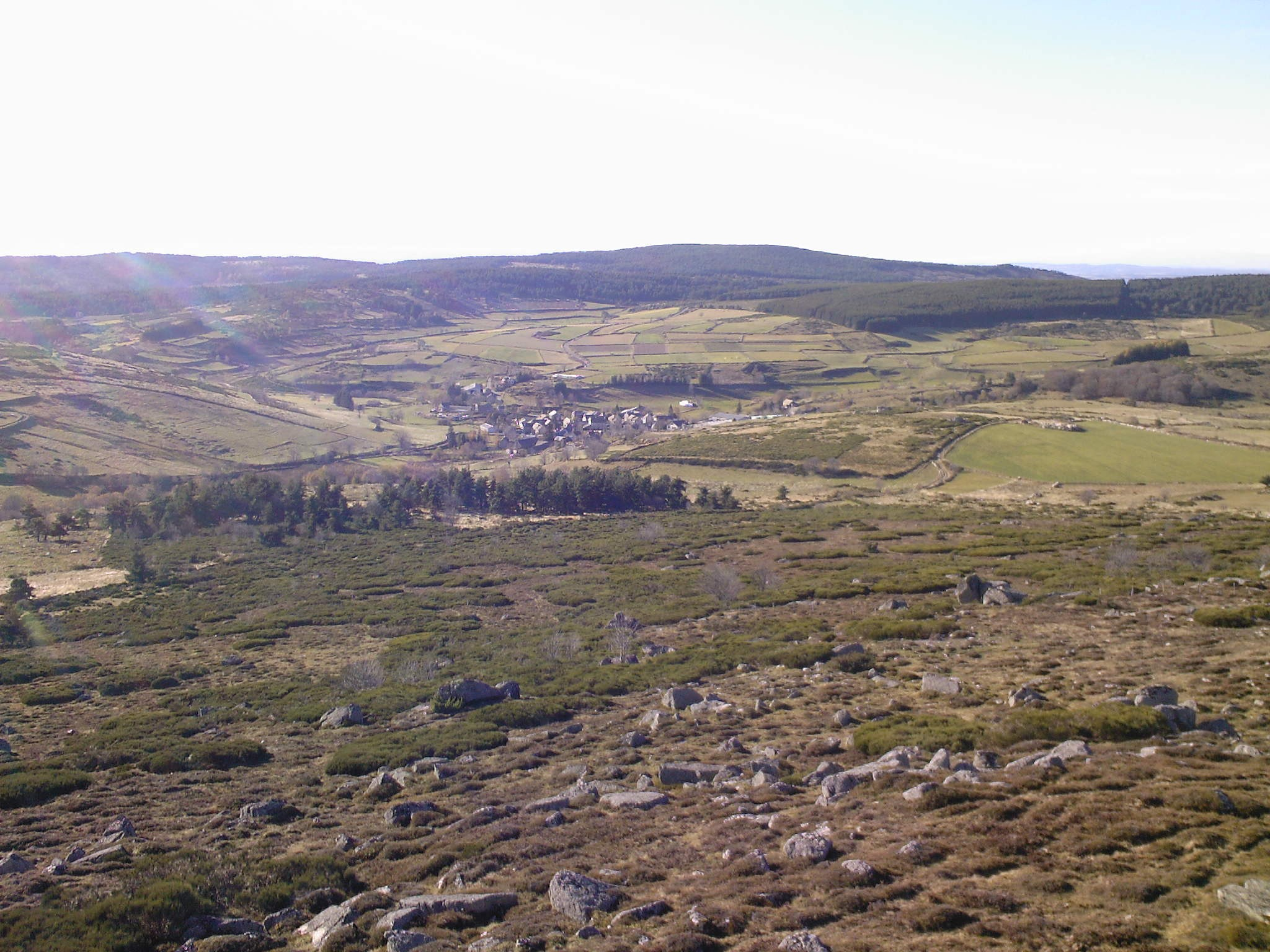 La Villedieu vue du Ron de la Rode